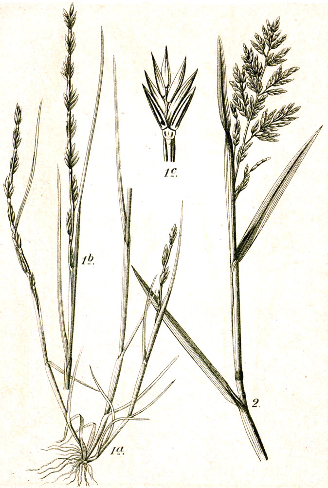 1. Micropyrum tenellum (L.) Link f. tenellum, syn. Festuca lachenalii (J.F.Gmel.) Spenn. 2. Puccinellia rupestris (With.) Fernald & Weath., syn. Pseudosclerochloa rupestris (With.) Tzvelev, Festuca procumbens (Curtis) Kunth, nom. ill. Original Caption 1. Einfacher Schwingel, Festuca lachenalii Spenn. 2. Liegender Schwingel, F. procumbens Kunth.